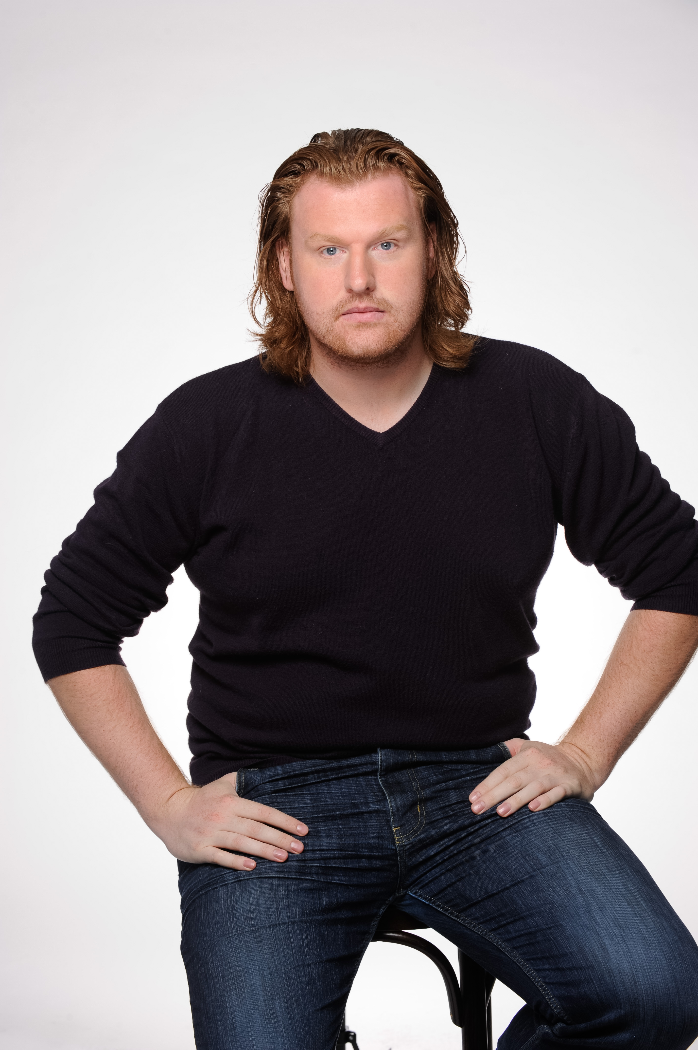 Milan van Weelden (Zoetermeer, 12 december 1980) is een Nederlands zanger, (musical)acteur en docent die in 2009 voor zijn eerste rol in een professionele musicalproductie, Man van La Mancha, een John Kraaijkamp Musical Award heeft gewonnen.